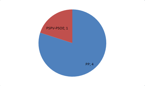 Número de concejales de las elecciones locales de 1991 y 1995 en Segart